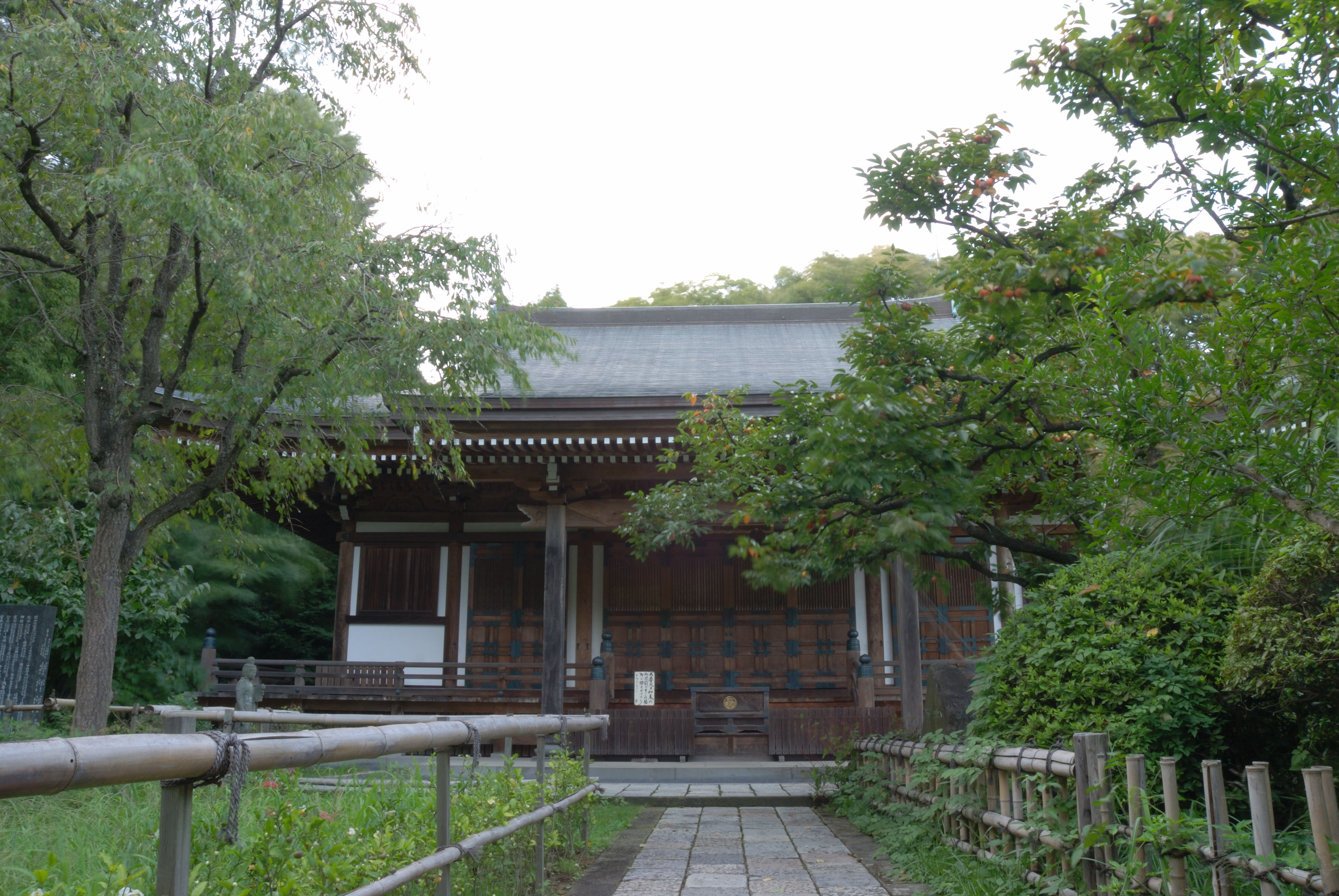 Ozen-ji hondo